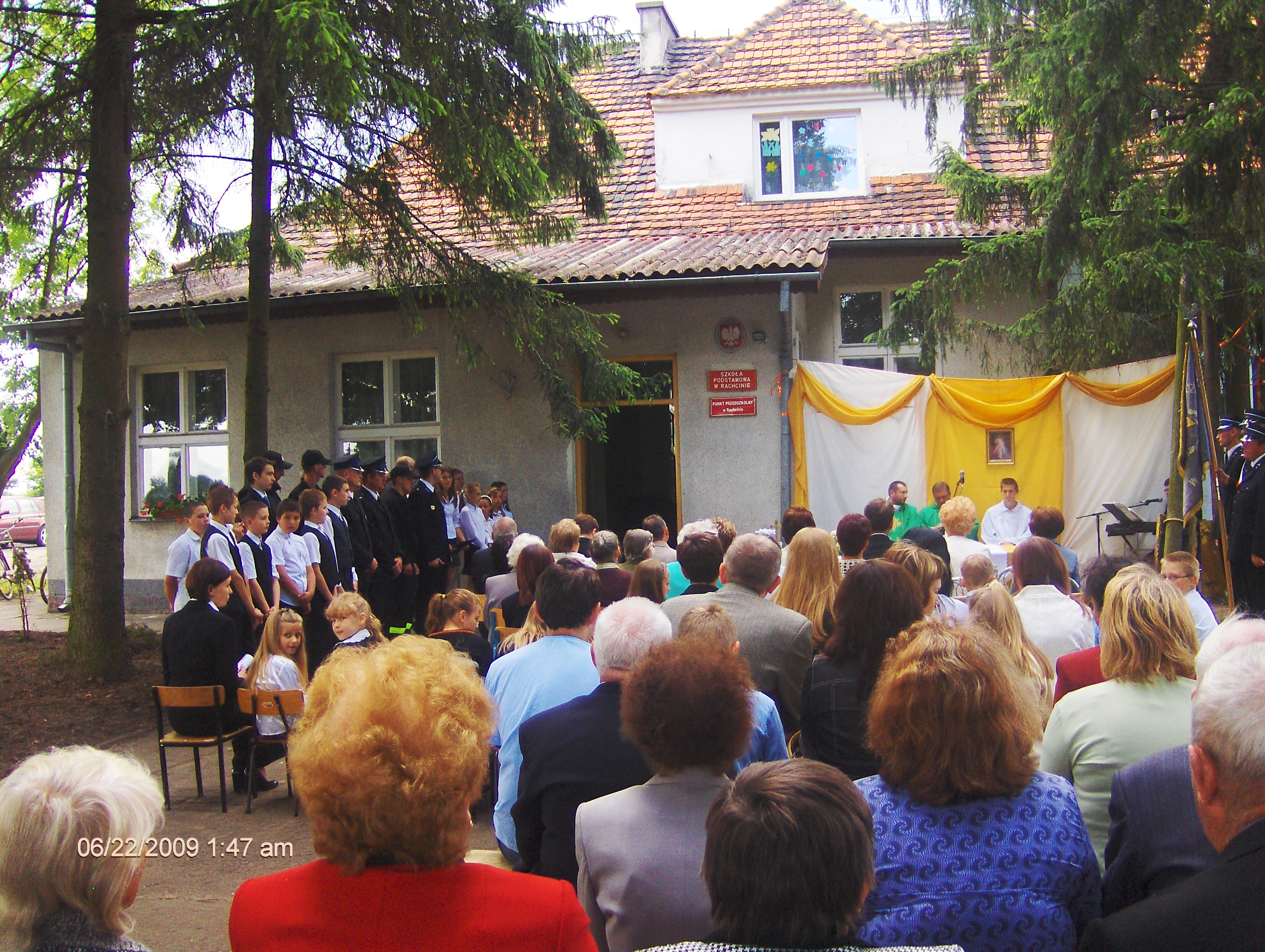 Budynek Szkoły Podstawowej i Punktu Przedszkolnego w Rachcinie